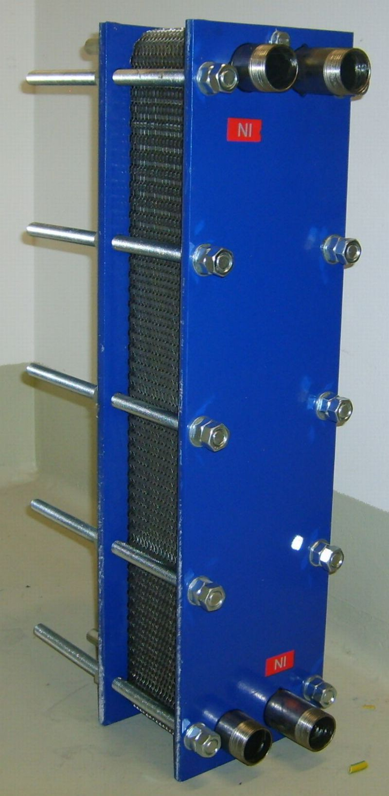 plate heat exchanger